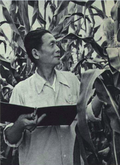 吴绍骙，中华人民共和国农业学家